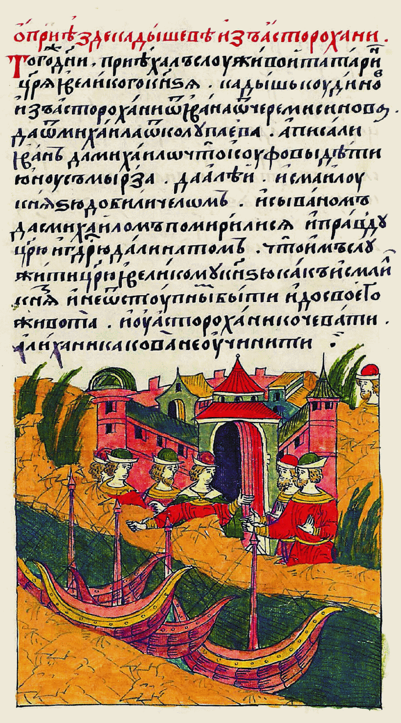 Лицевой летописный свод «...Юсуфовы дети, Юнус-мурза и Алей, перед князем Исмаилом признали свою зависимость, и с Иваном [Черемесиновым] и Михаилом [Колупаевым] помирились и дали клятву царю и государю в том, что им служить царю и великому князю, как князю Исмаилу, и быть неотступными до своей смерти, и у Асторохани кочевать, и ничего плохого не замышлять. [И Иван да Михайло дали им суда, чтобы было на чем плыть к Исмаилу и чем в Волге кормиться; а Юнус-мурза с братьями пришел на царя Дербыша и его прогнали, а пушки, которые ему прислал Крымский царь, Юнус захватил и отослал в город к Ивану и Михаилу. А царь Дербыш побежал в Азов, а оттуда к Мекке».]